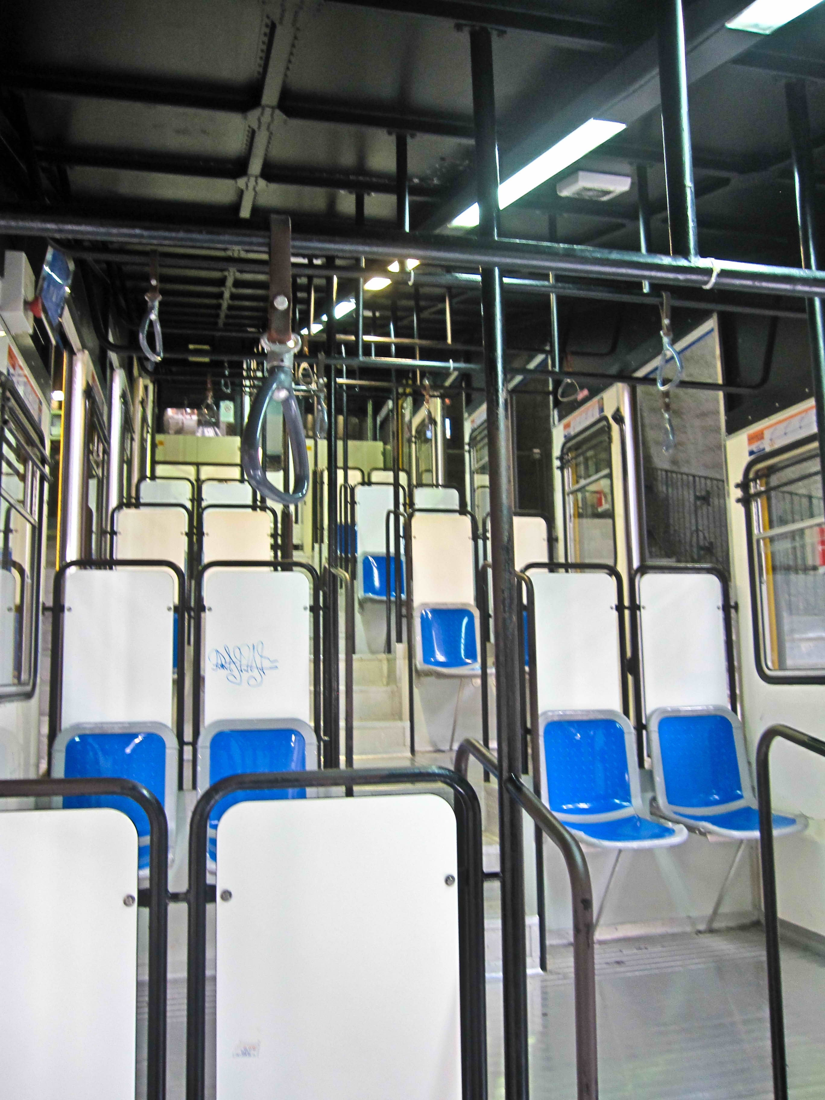 Interno di una vettura.